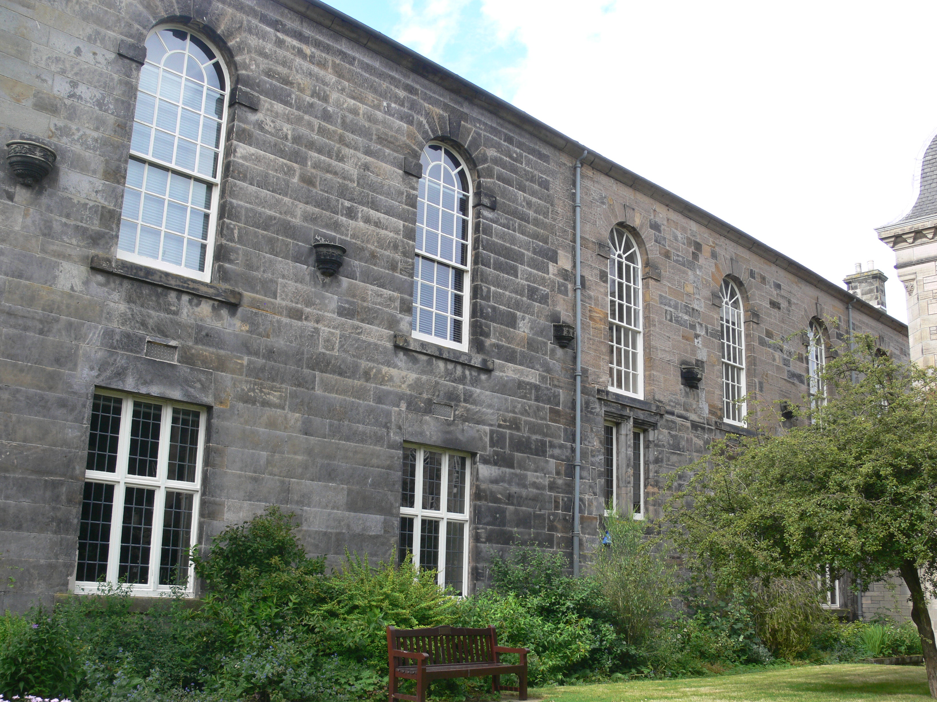 St Mary's quad